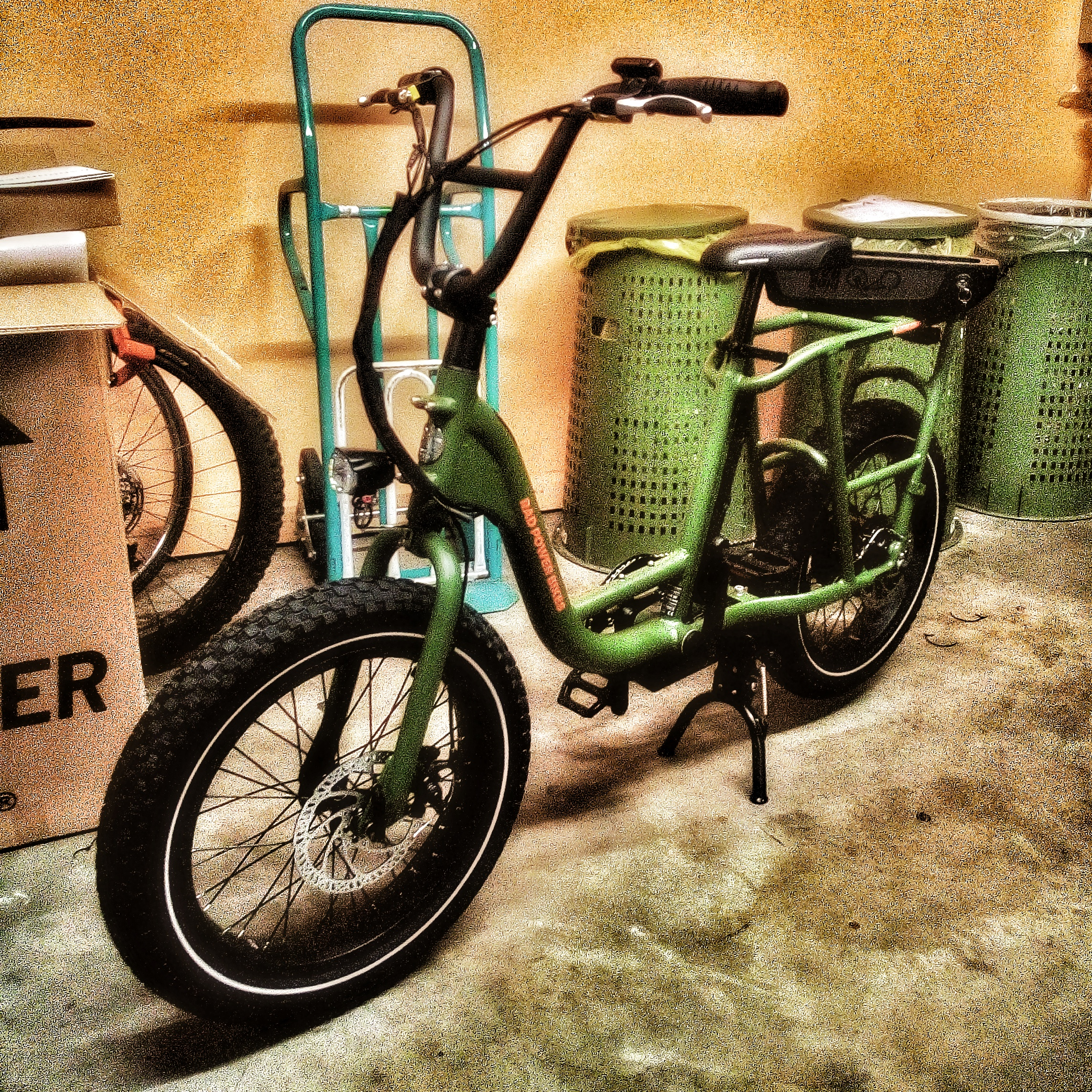 Rad Runner è un modello di E-Bike commercializzata da PowerBike. Questa versione ha un motere da 250w